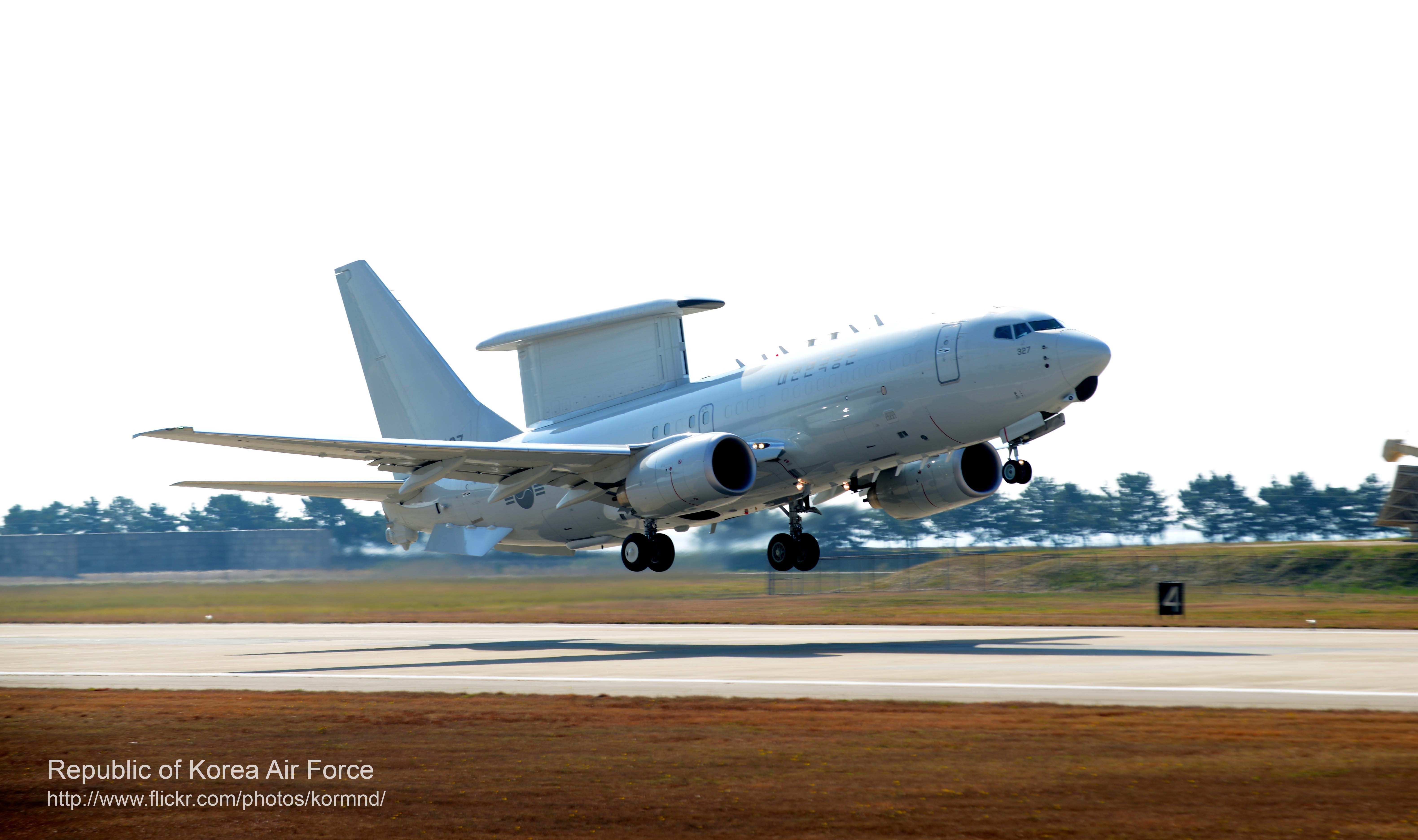 7. 10월 31일(수) 군산기지에서 '12-2차 맥스선더 공격편대군 훈련을 위해 한국공군의 조기경보통제기 E-737 피스아이가 이륙하고 있다.